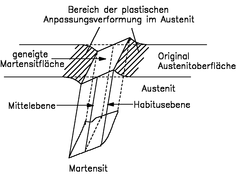 chematische Darstellung der Oberflächenreliefbildung beim Wachstum eines Martensitkristalls